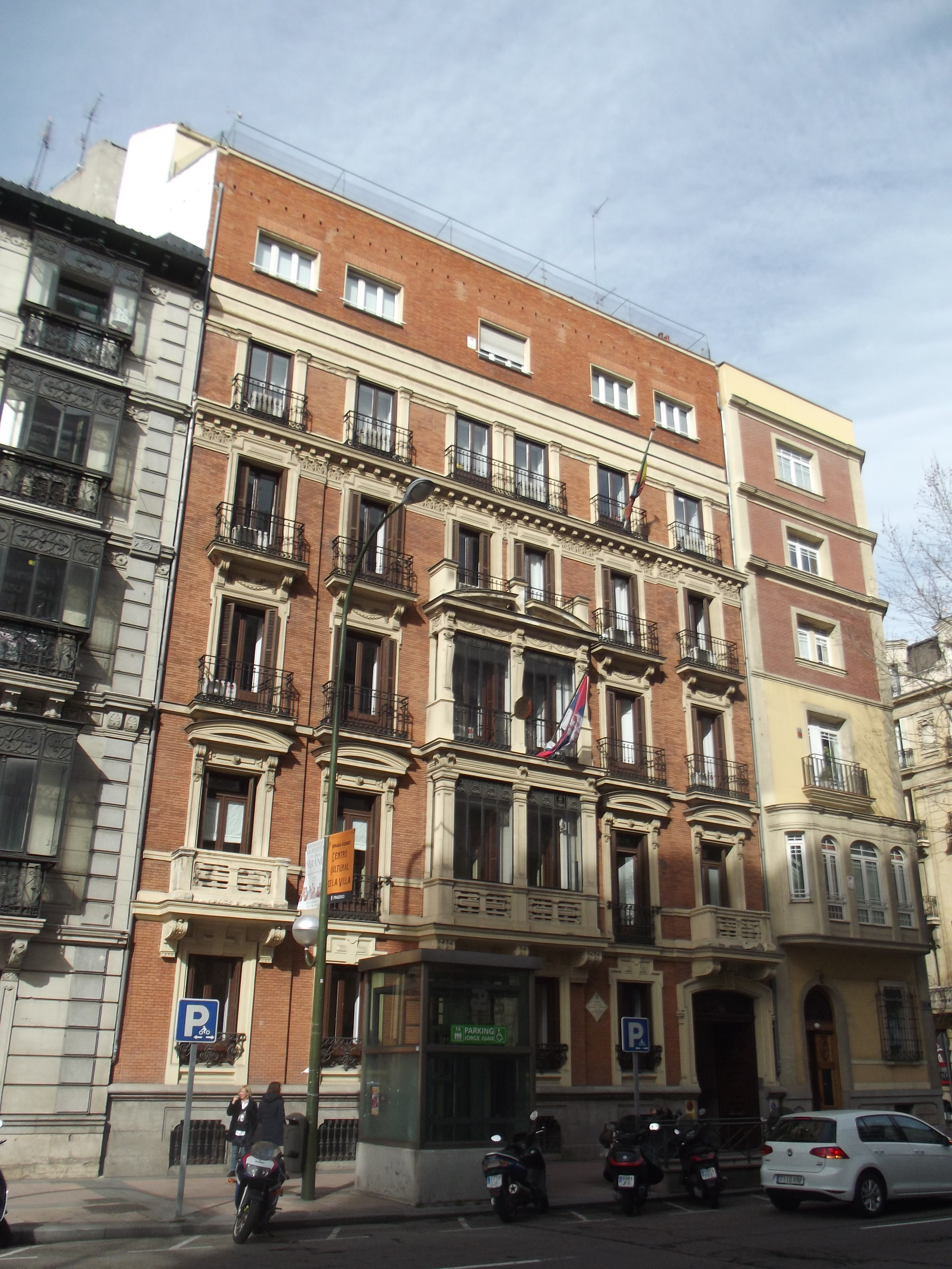 Viviendas del arquitecto Ricardo García Guereta, Madrid.